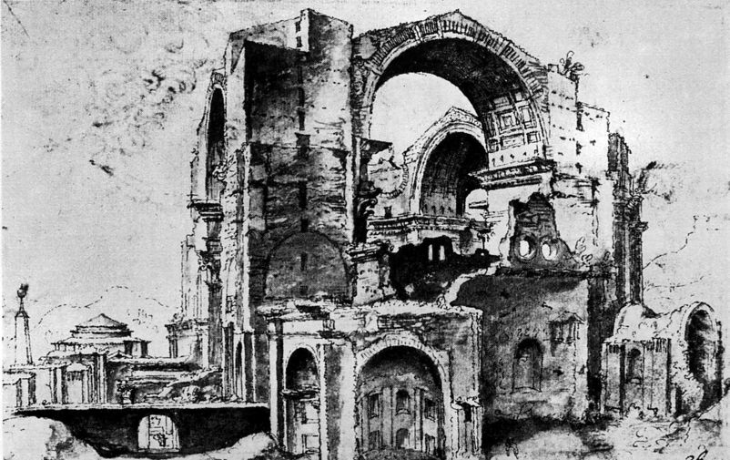 StPieter in aanbouw